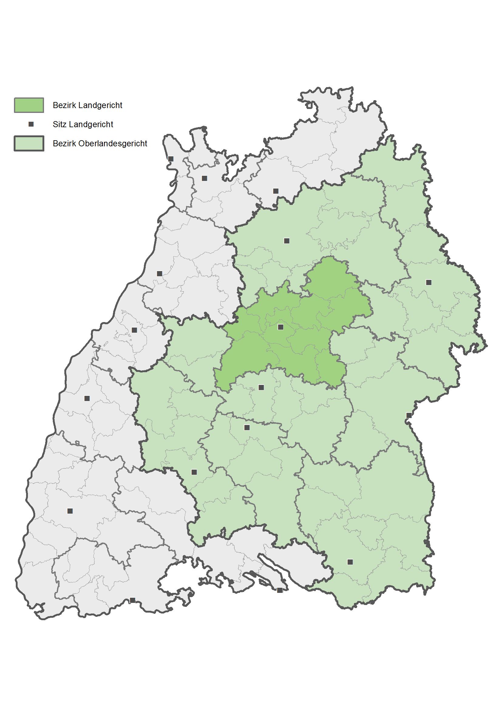 Karte des Bezirks des Landgerichts Stuttgart in Baden-Württemberg